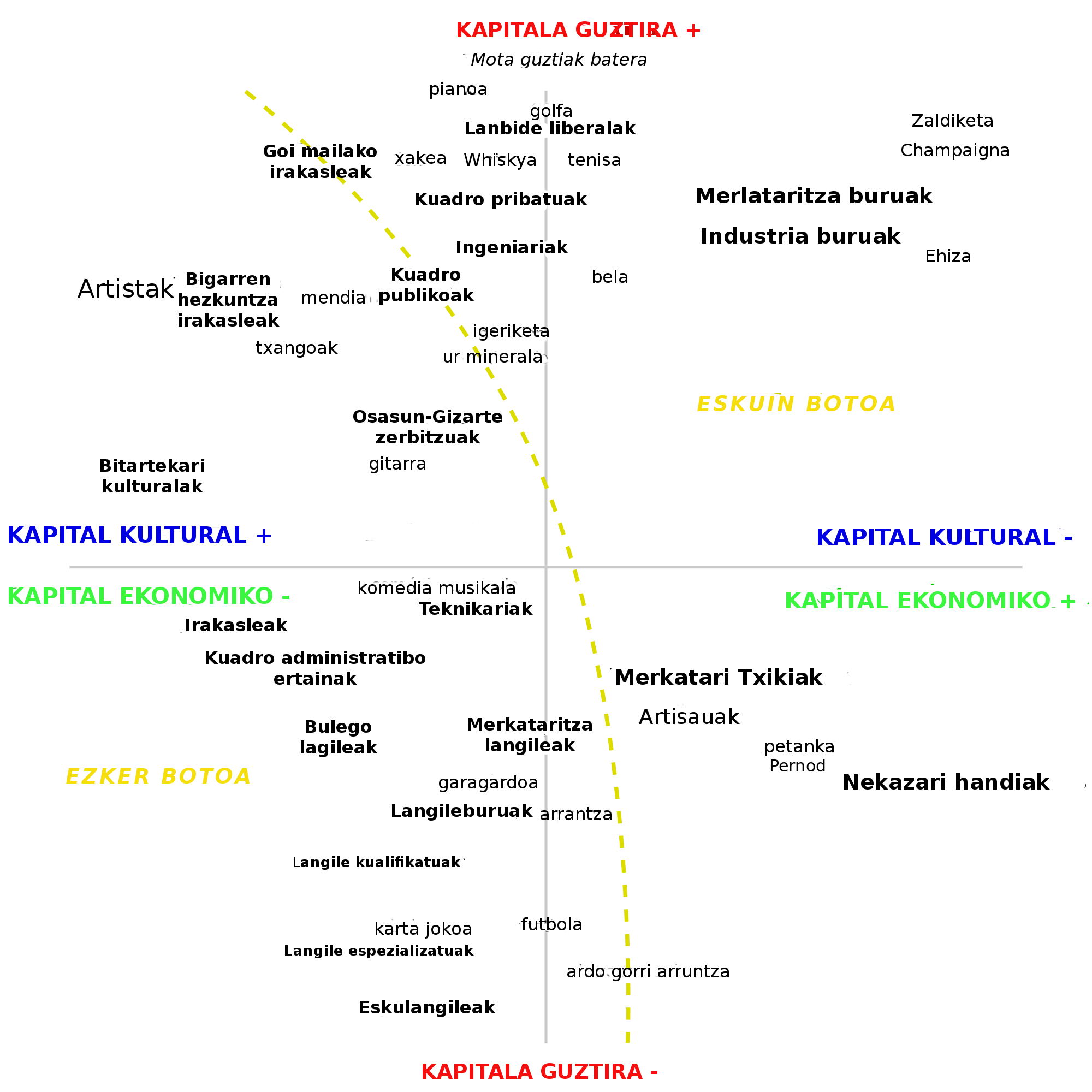 Bourdieuren espazio soziala irudikatzen duen diagrama